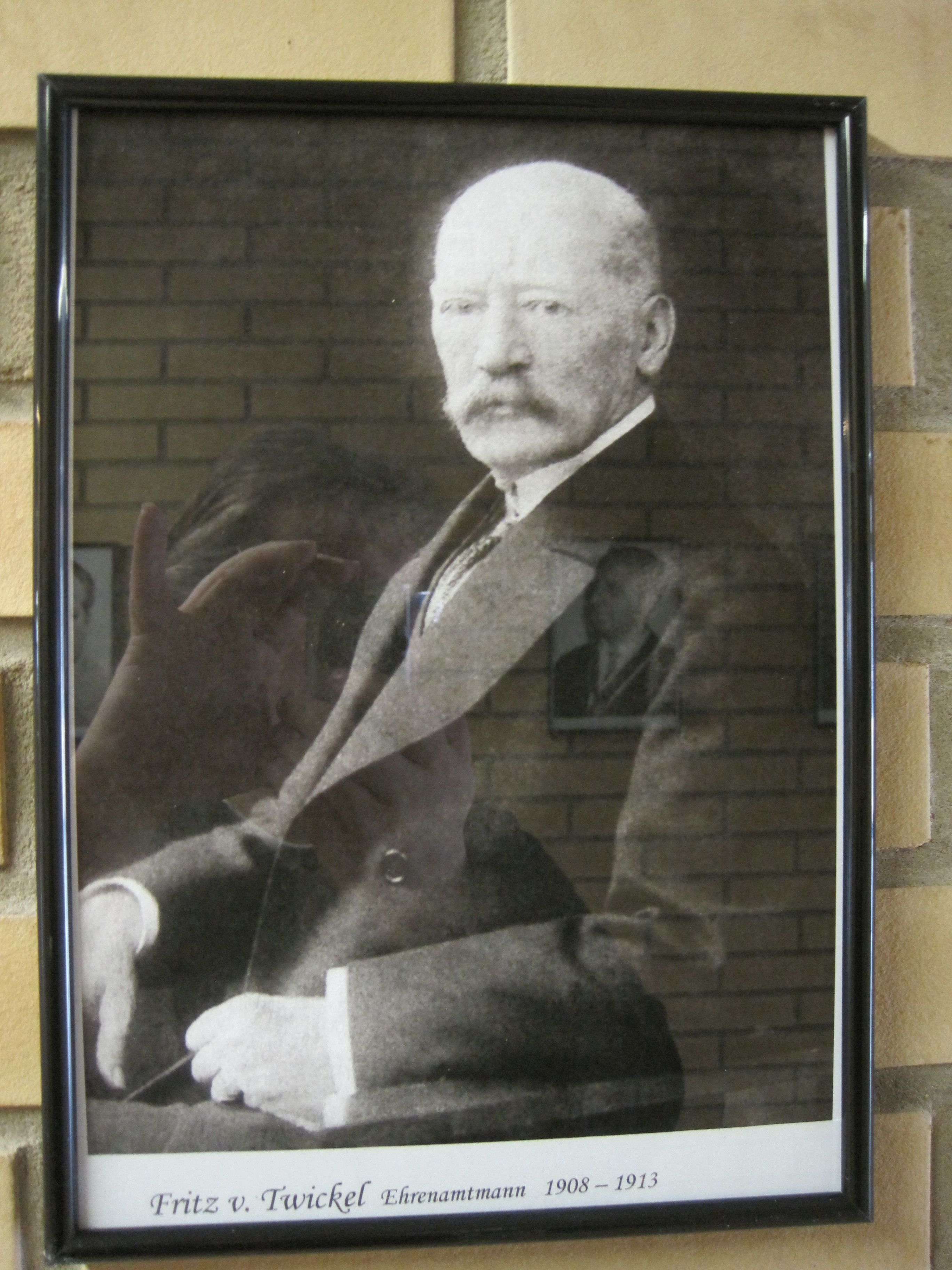 Das Foto zeigt ein Bild im Rathaus Bockum-Hövel.